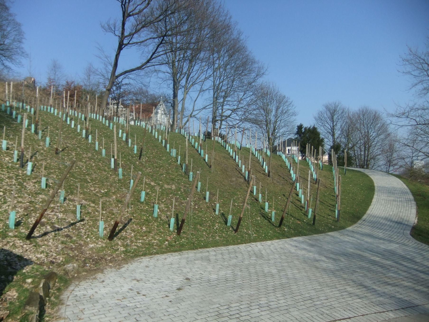 Winzerscher Garten Bielefeld